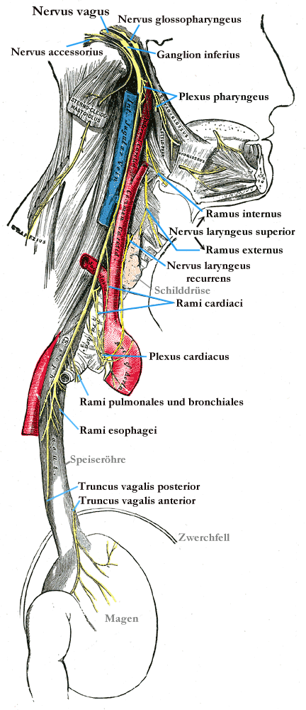 Vagusgruppe, Image:Gray793.png, nachbearbeitet und Beschriftung modifiziert (Deutsch/german) von Benutzer:Uwe Gille